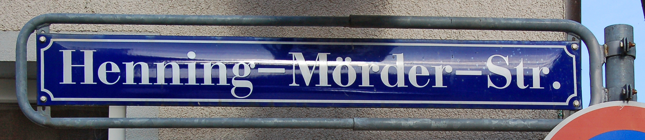 Schild der Hennig-Mörder-Straße in Stralsund